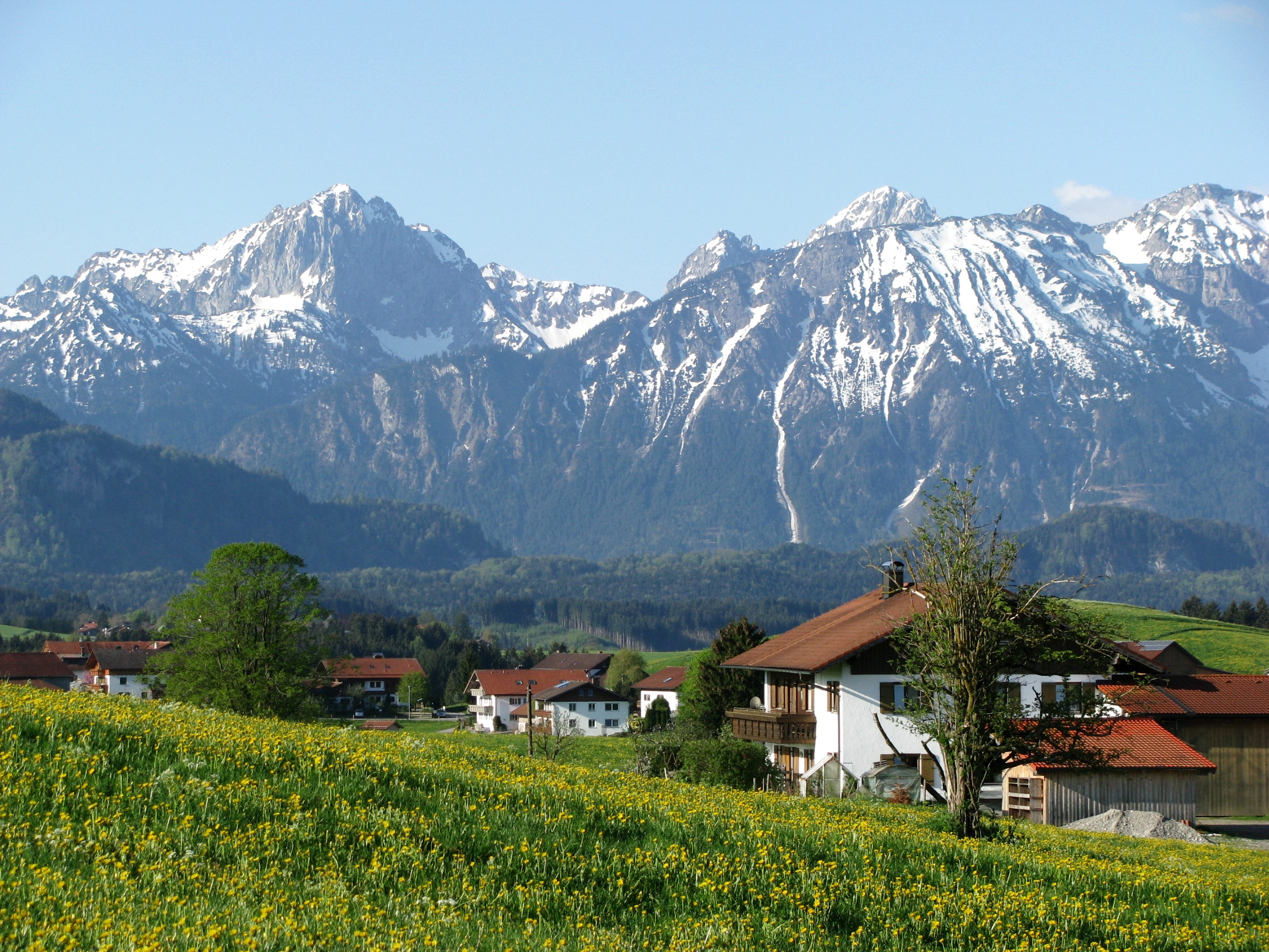 Blick von Rieden am Forggensee auf die Ostallgäuer Berge.